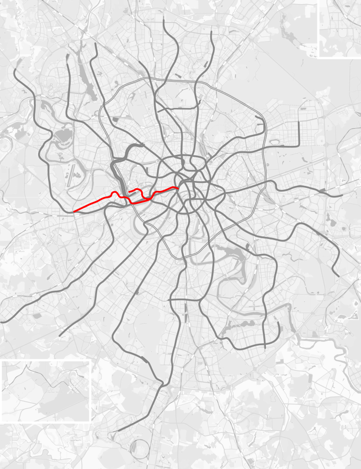 Филёвская линия Московского метрополитена